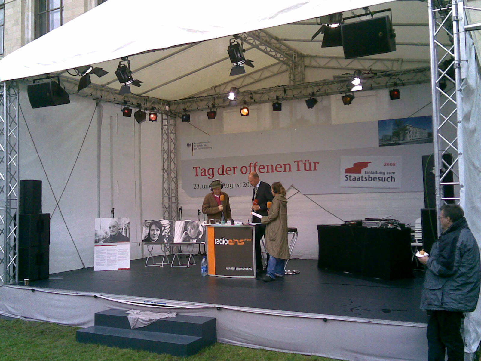 radioeins Live-Sendung - mit Patricia Pantel, Andreas "Autopapst" Keßler und Bundesverkehrsminister Tiefensee am 24. August 2008